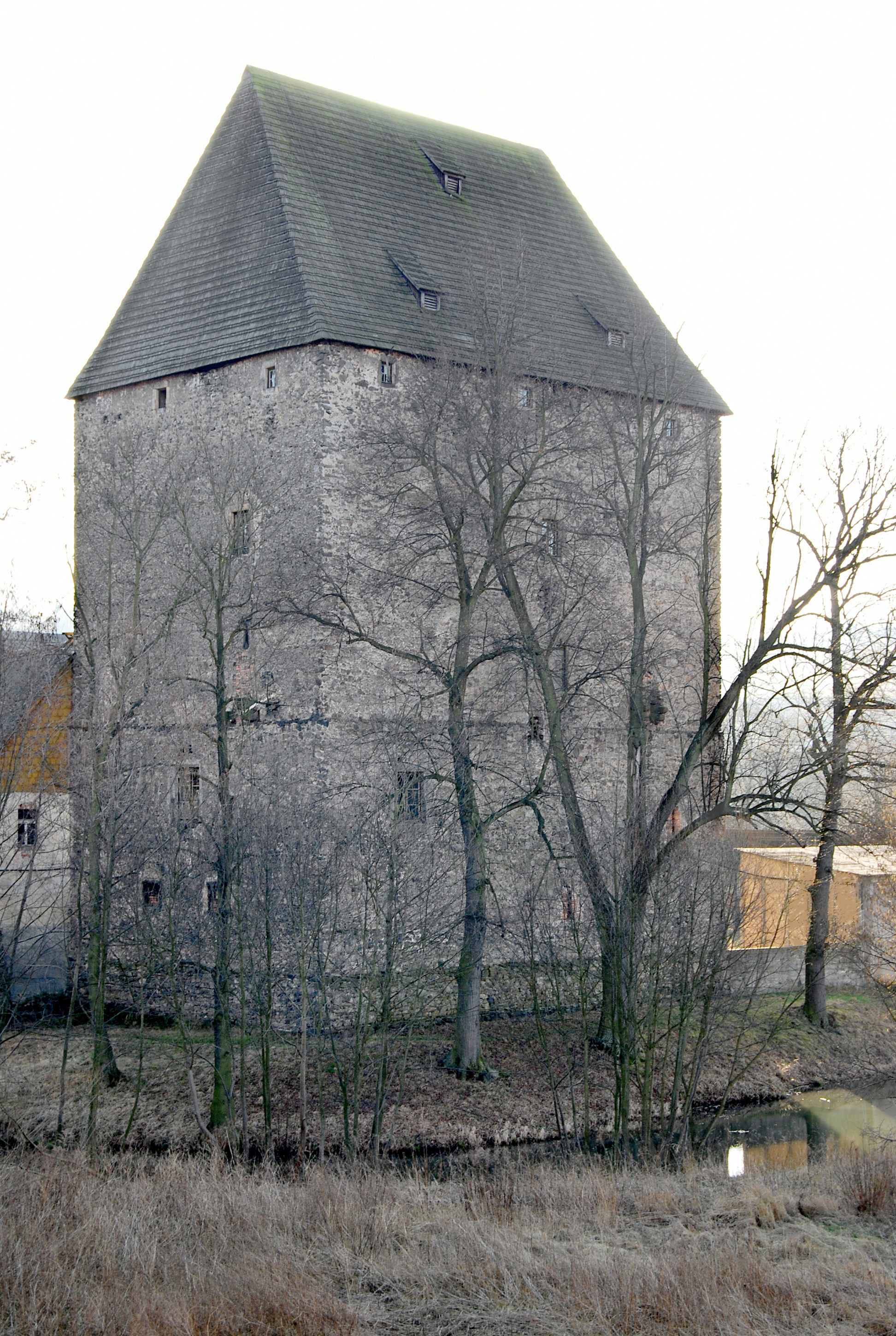 Wieża Książęca w Siędlęcinie, koło Jeleniej Góry